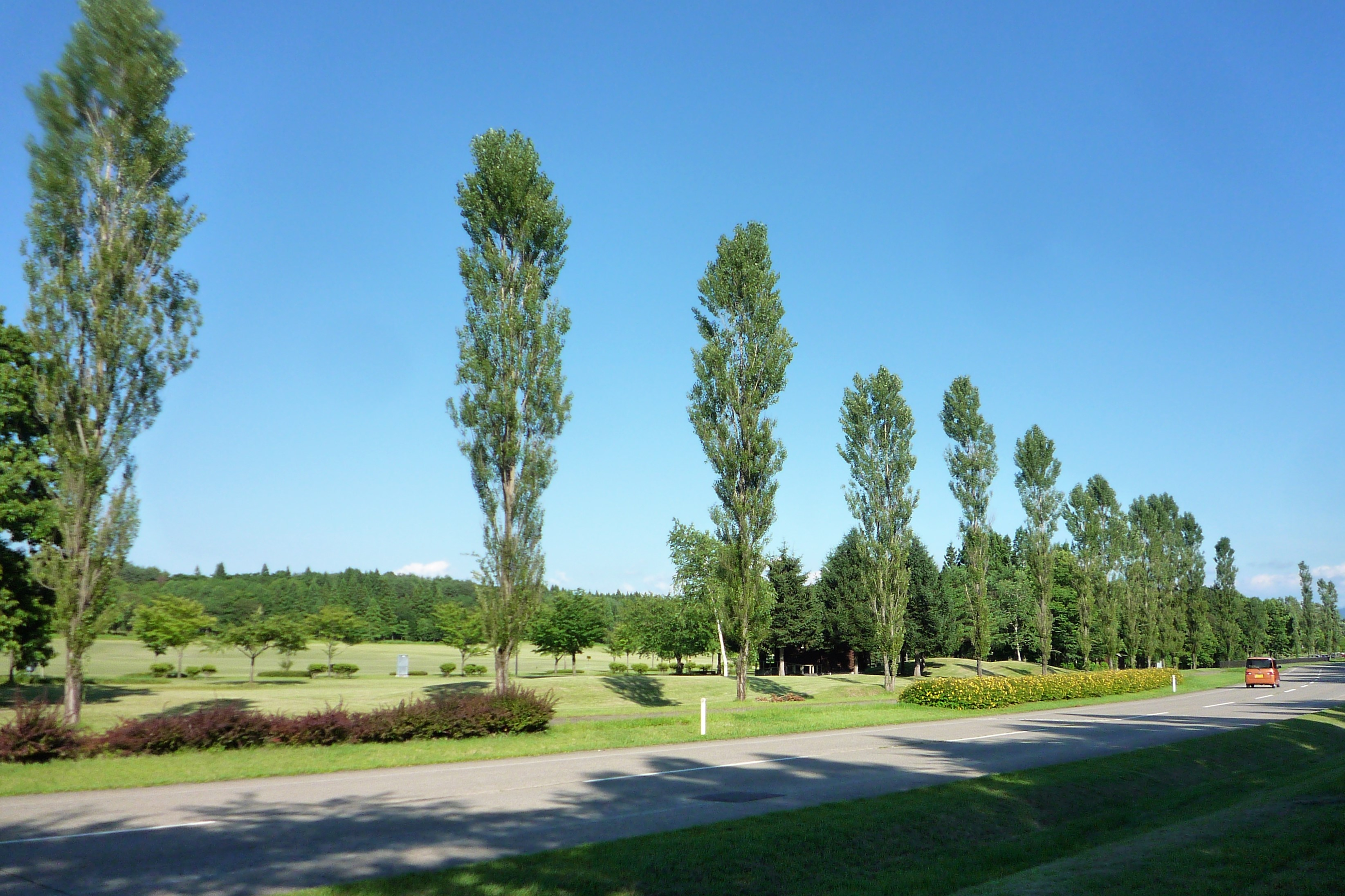 秋田県立北欧の杜公園：南駐車場付近